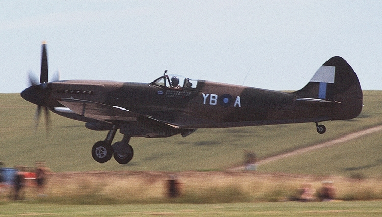 ybacropshp2